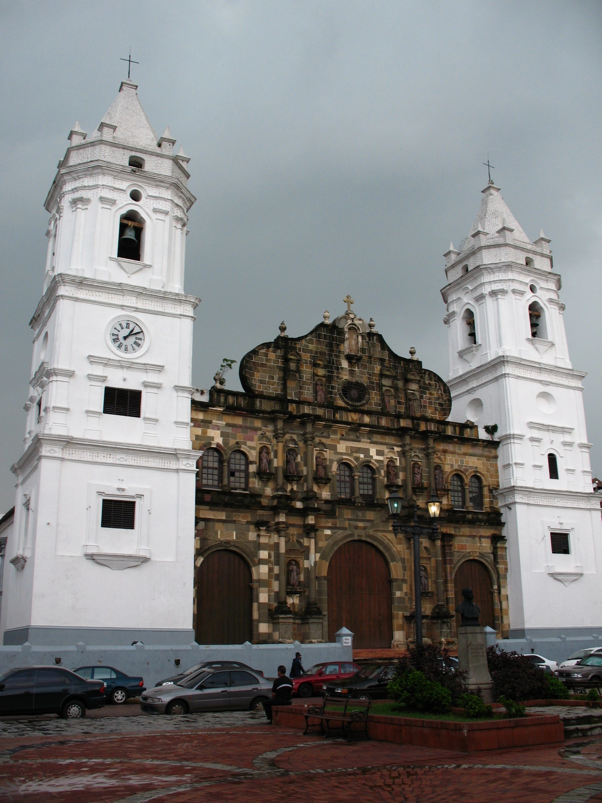 Catedral Metropolitana de la Ciudad de Panamá en la zona de Panamá La Vieja.